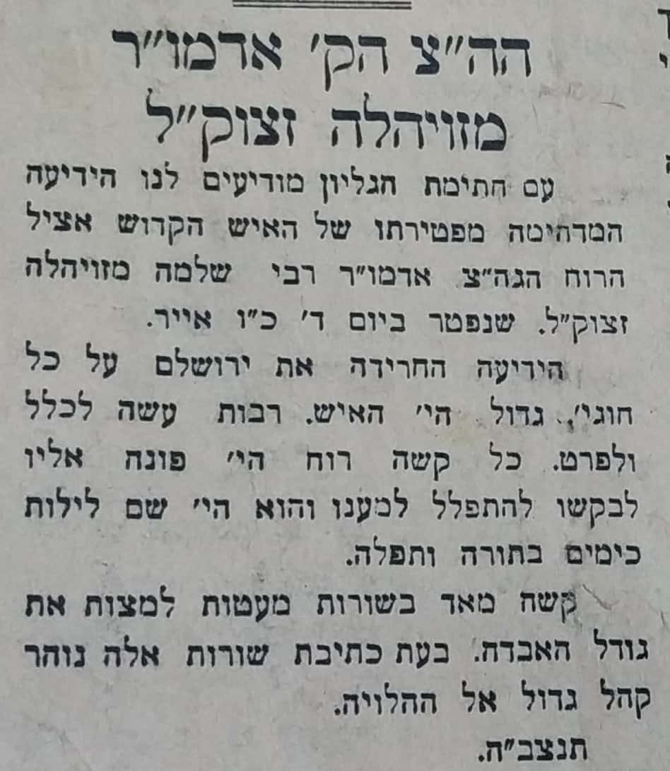 הודעה על פטירתו עיתון קול ישראל 10 במאי 1945.